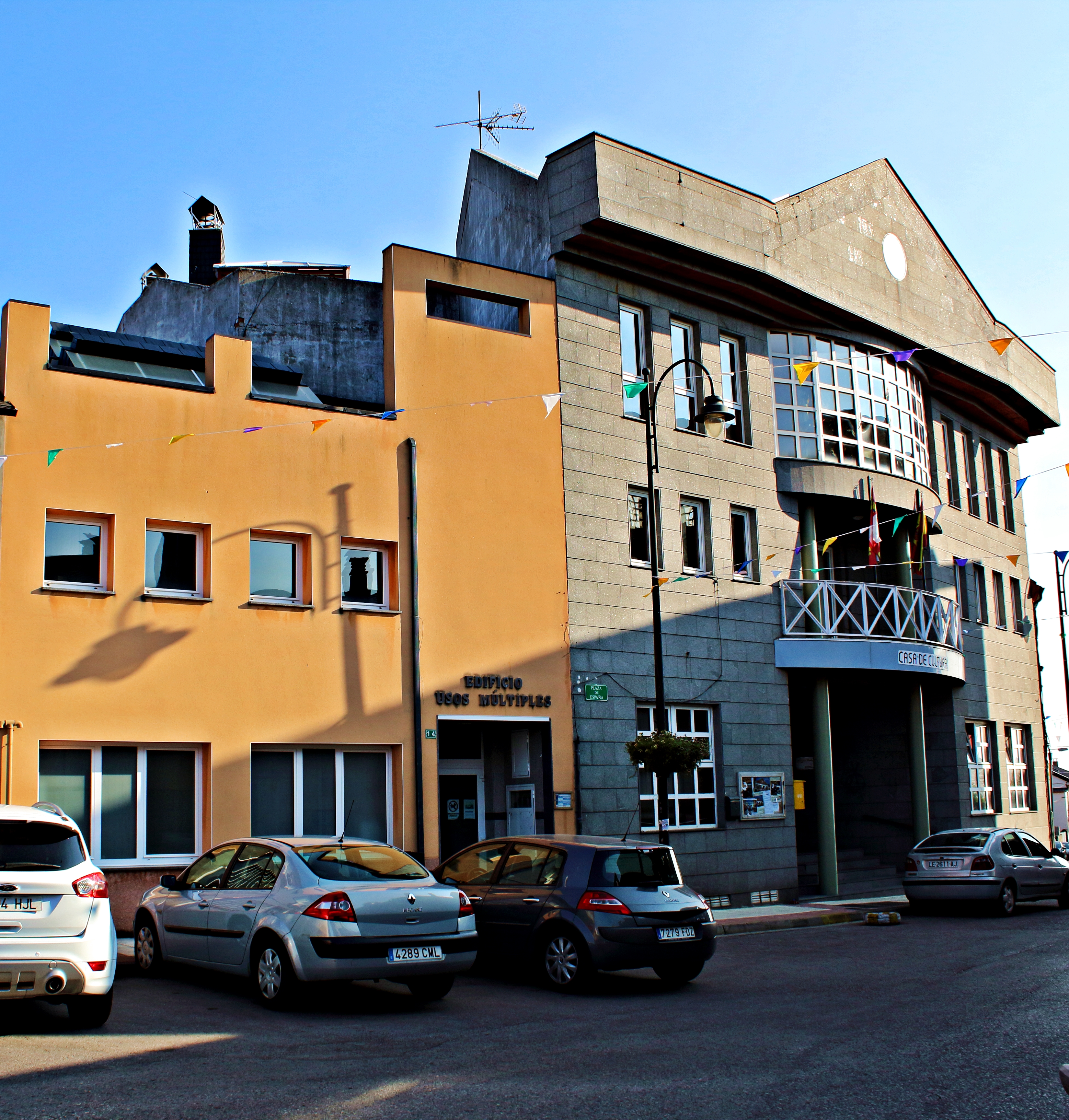 Lillo del Bierzo localidad de Fabero, comarca de El Bierzo, provincia de León